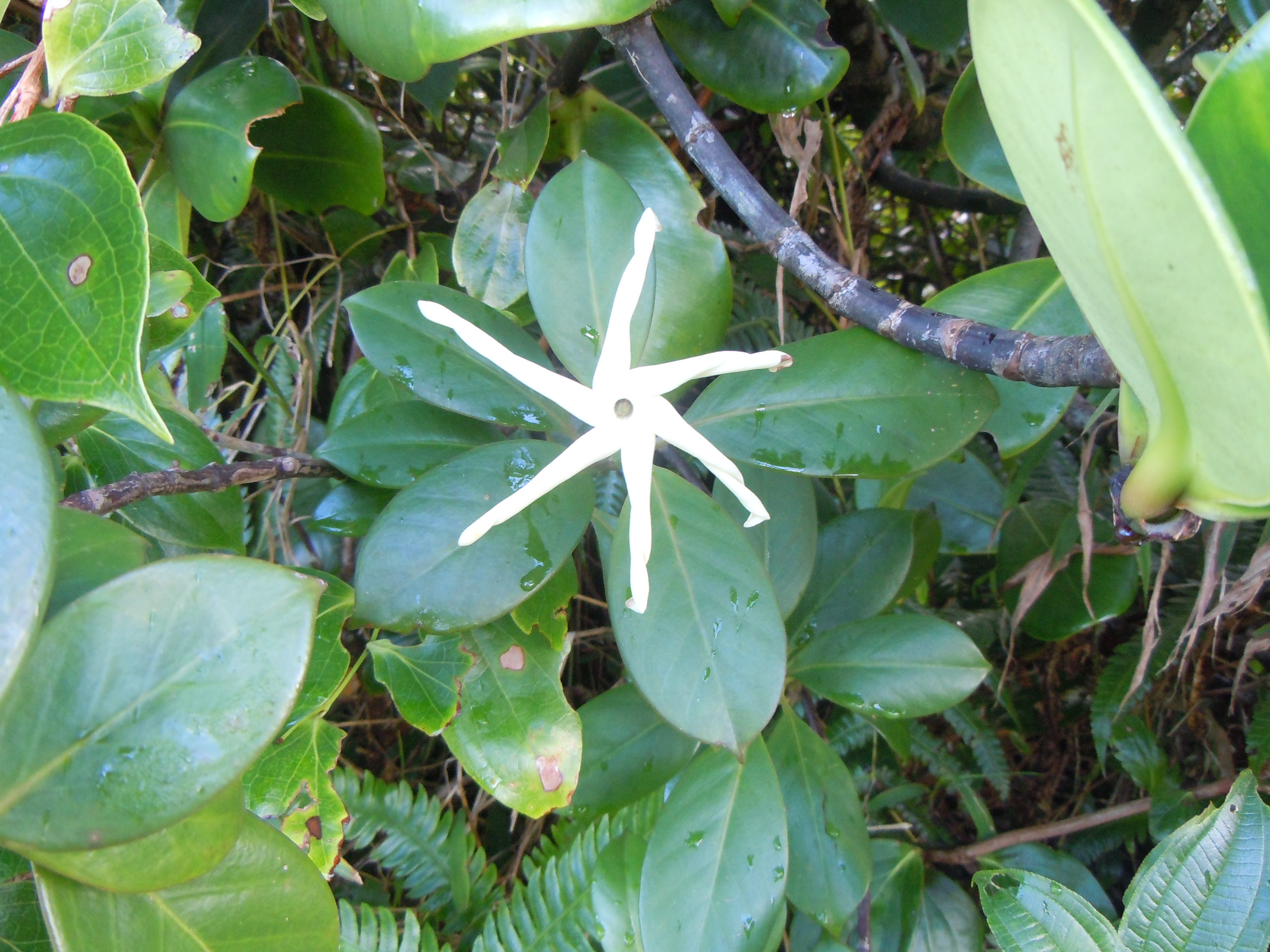 Hillia parasitica-La Soufrière-Guadeloupe